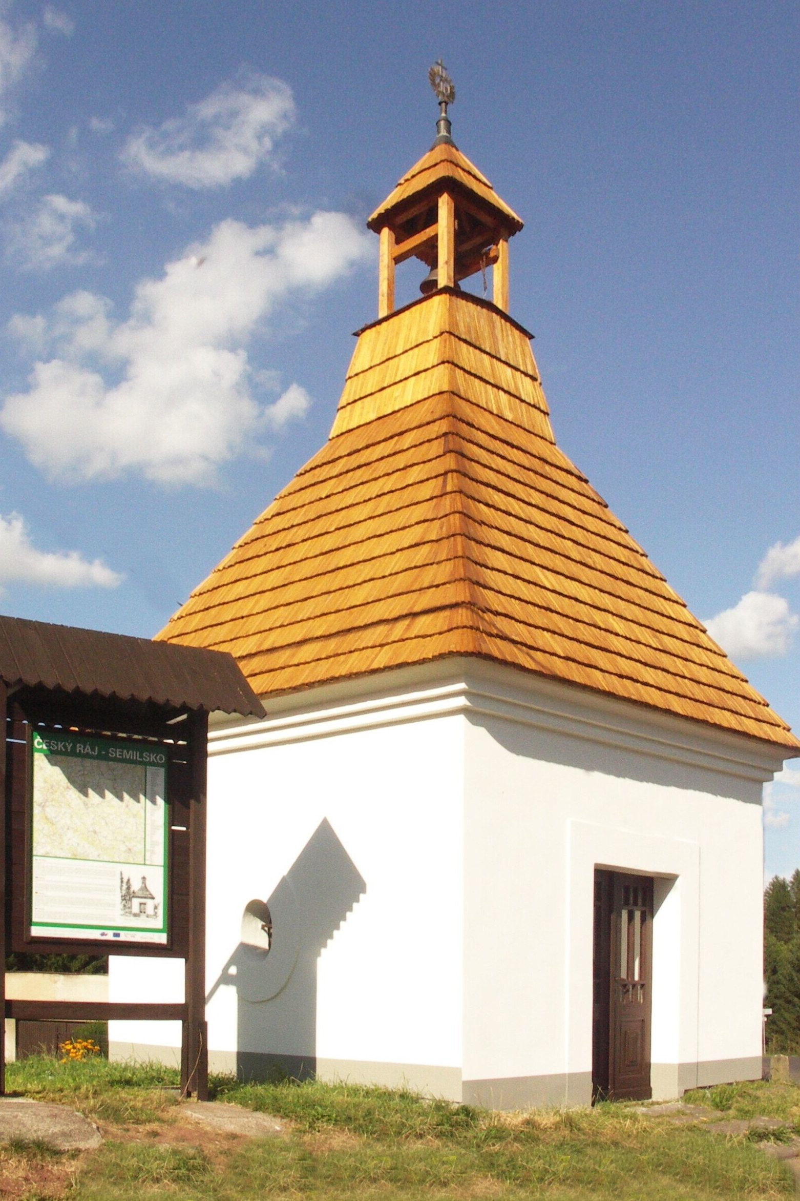 Sejkorská Kaplička, Cimbál, Bozkov, nedávno restaurovaná kaplička, která je úzce spjata s historií bozkovského kostela.